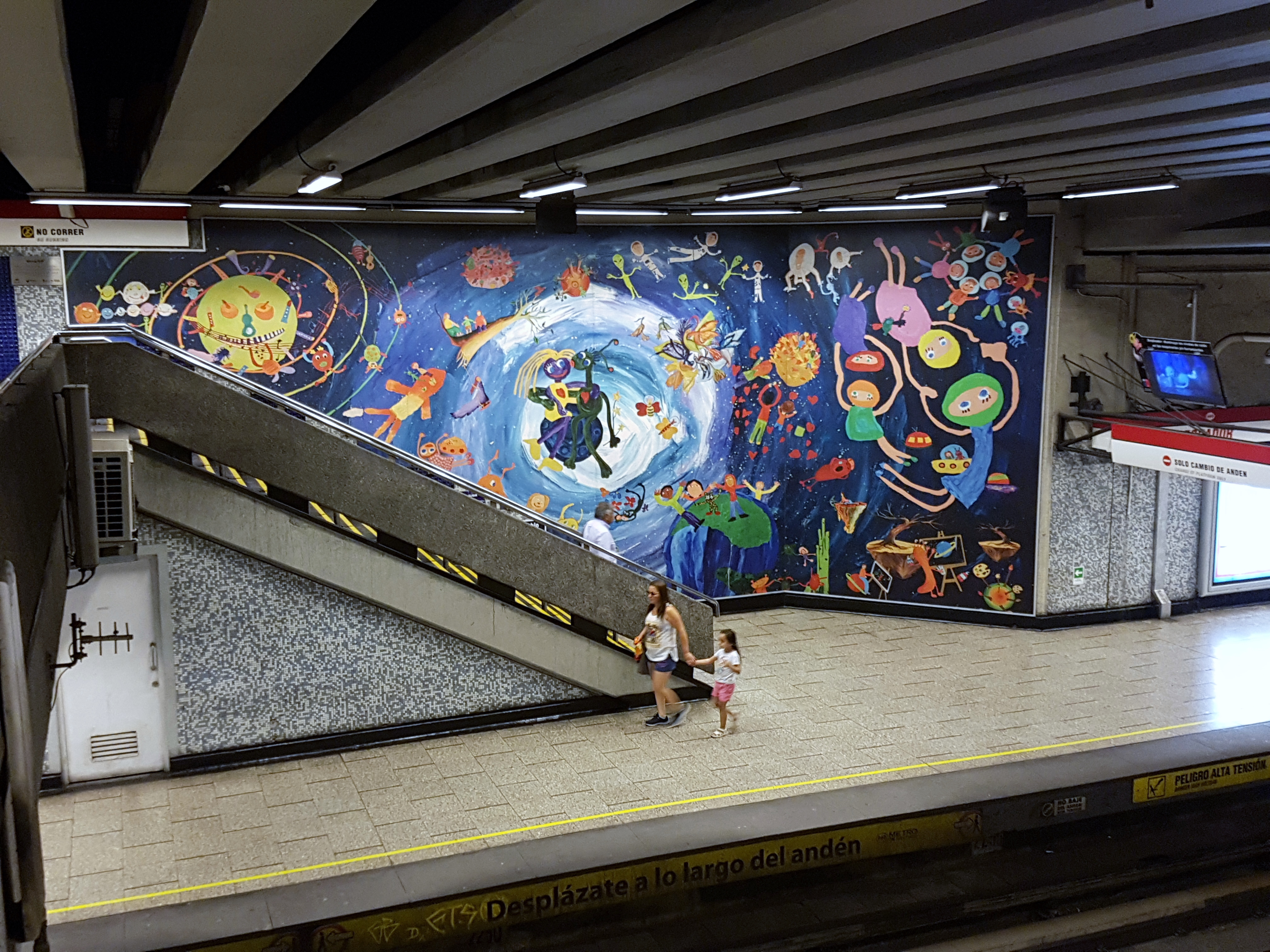 El metro Ecuador está adornado con murales realizados por el pintor Jorge Artus (artista con discapacidad: no tiene brazos) y los niños del taller de arte de la Teletón, Santiago de Chile.